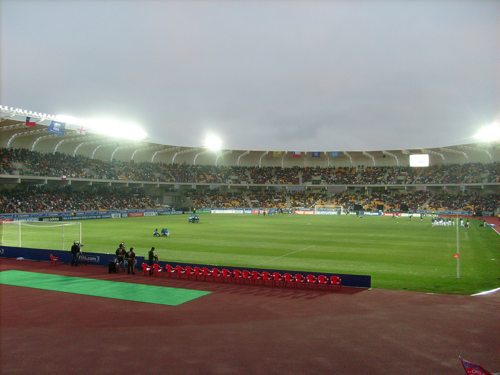 Estadio Francisco Sánchez Rumoroso (1er asiento :P)